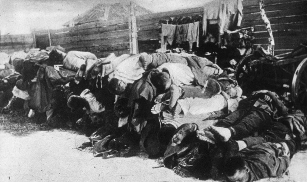 Трупы умерших от тифа в Новониколаевске. Период Гражданской войны